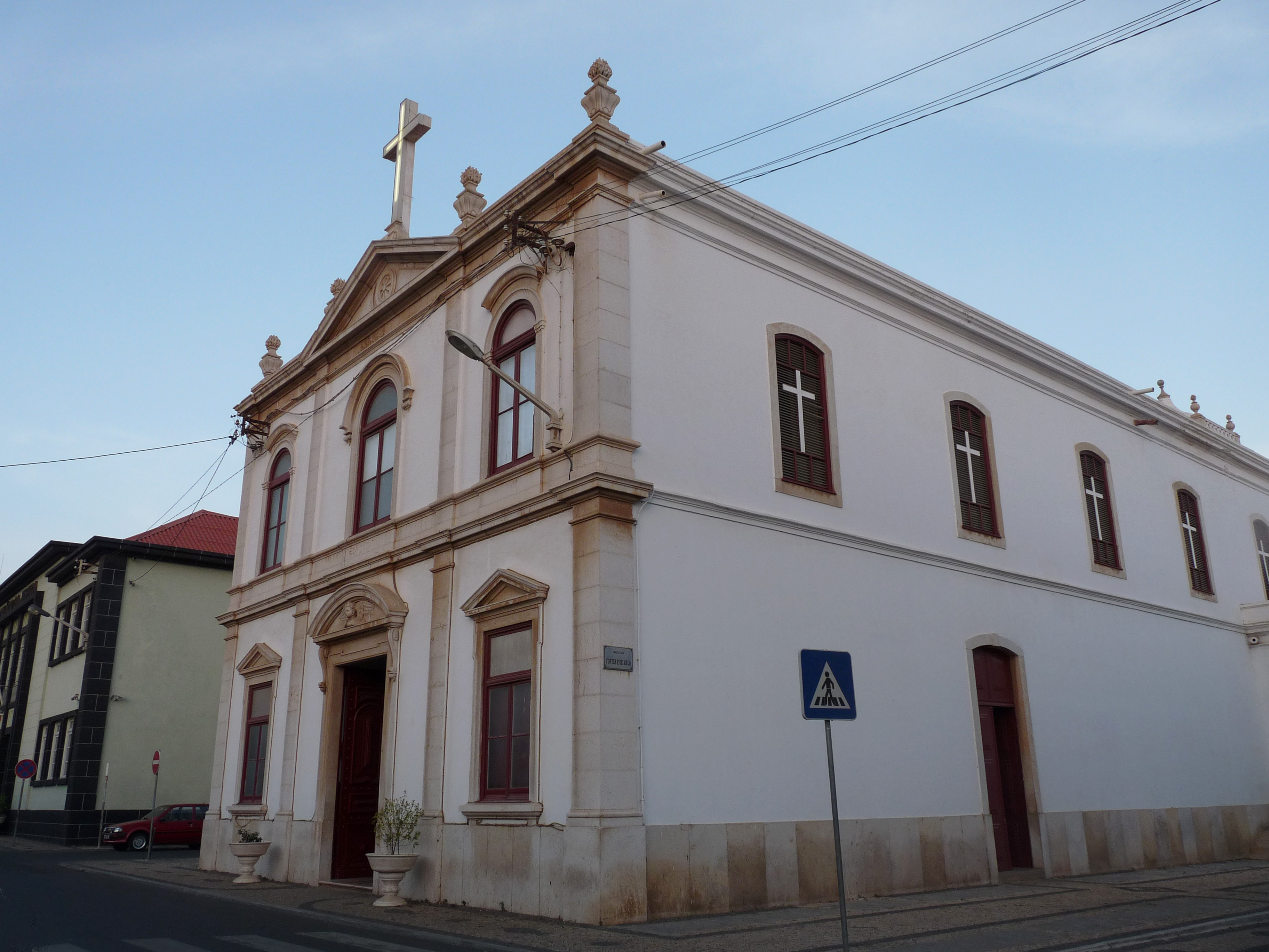 Praia (Cap-Vert) : Igreja Nossa Senhora da Graça